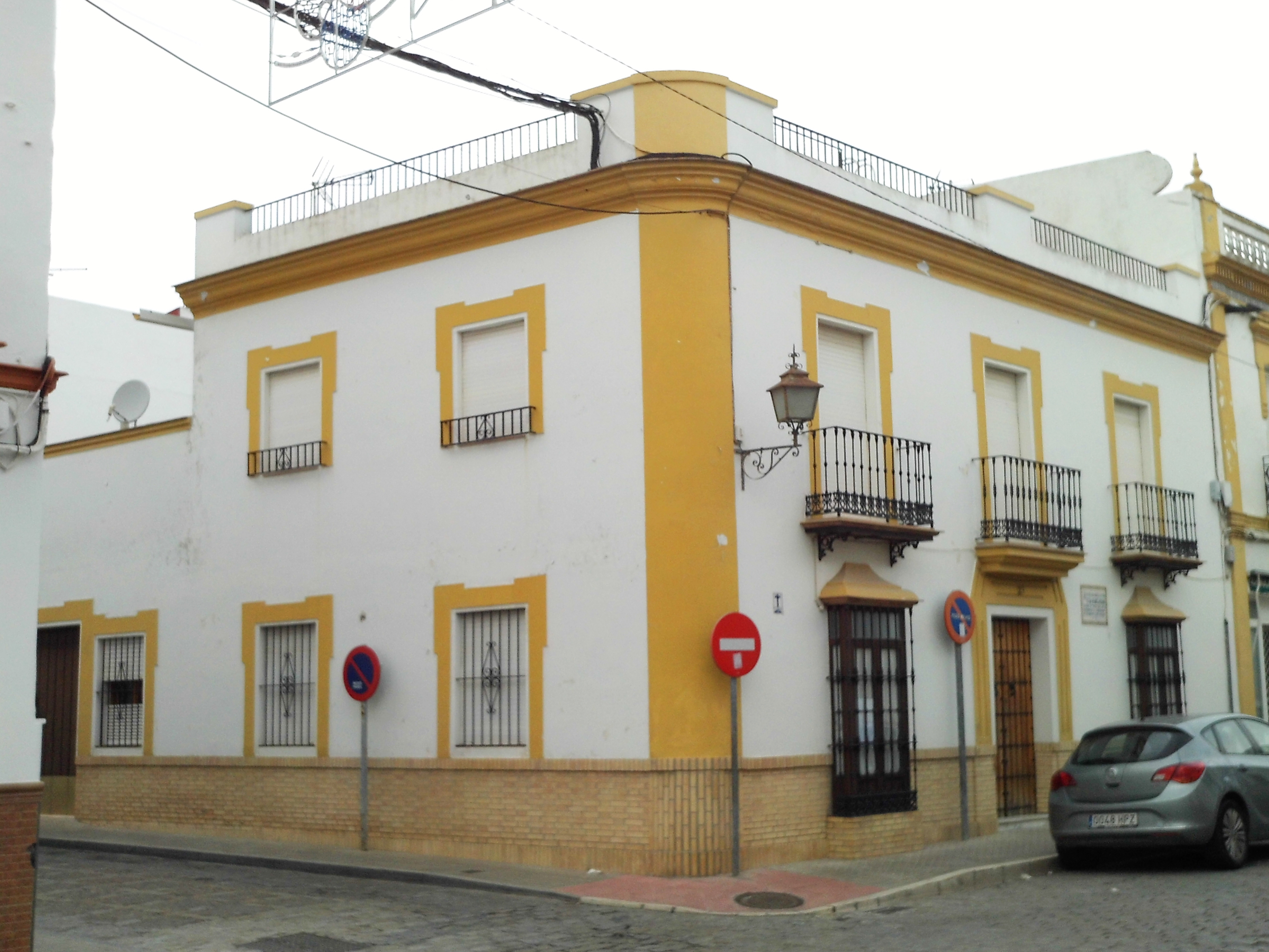 Casa en la que nació Celia Méndez y Delgado (María Teresa del Corazón de Jesús) en 1844. María Teresa del Corazón de Jesús fundó la Congregación de Esclavas del Divino Corazón. Fuentes de Andalucía. Sevilla, Andalucía, España.